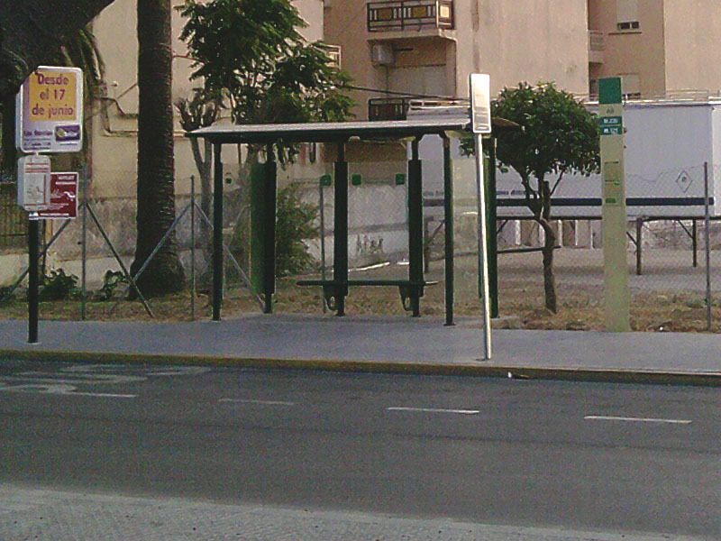 Terminal de autobuses urbanos y metropolitanos en la Alameda de Alfonso XI, San Roque.